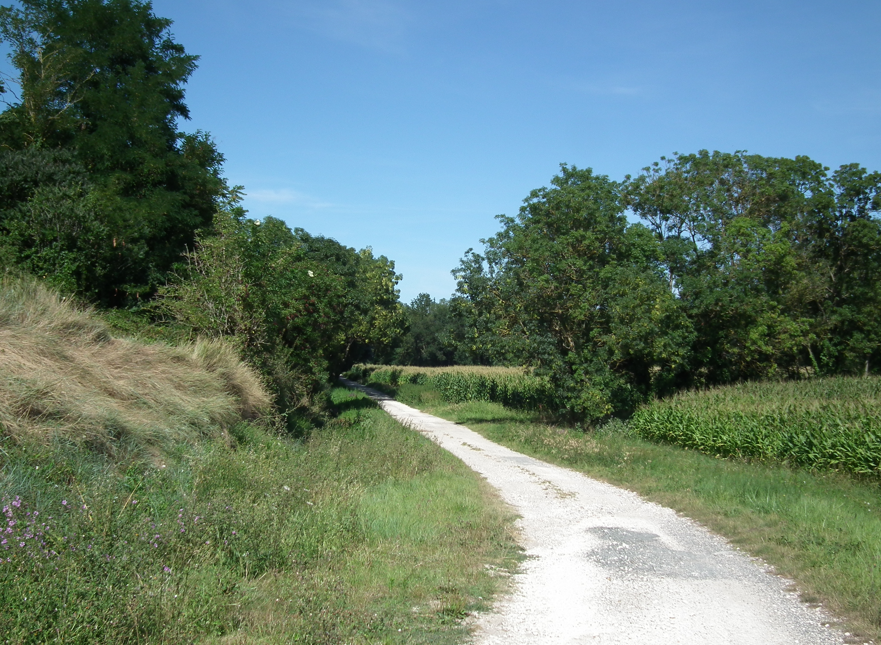 Paysage de brandes près de Saint-Georges-de-Didonne